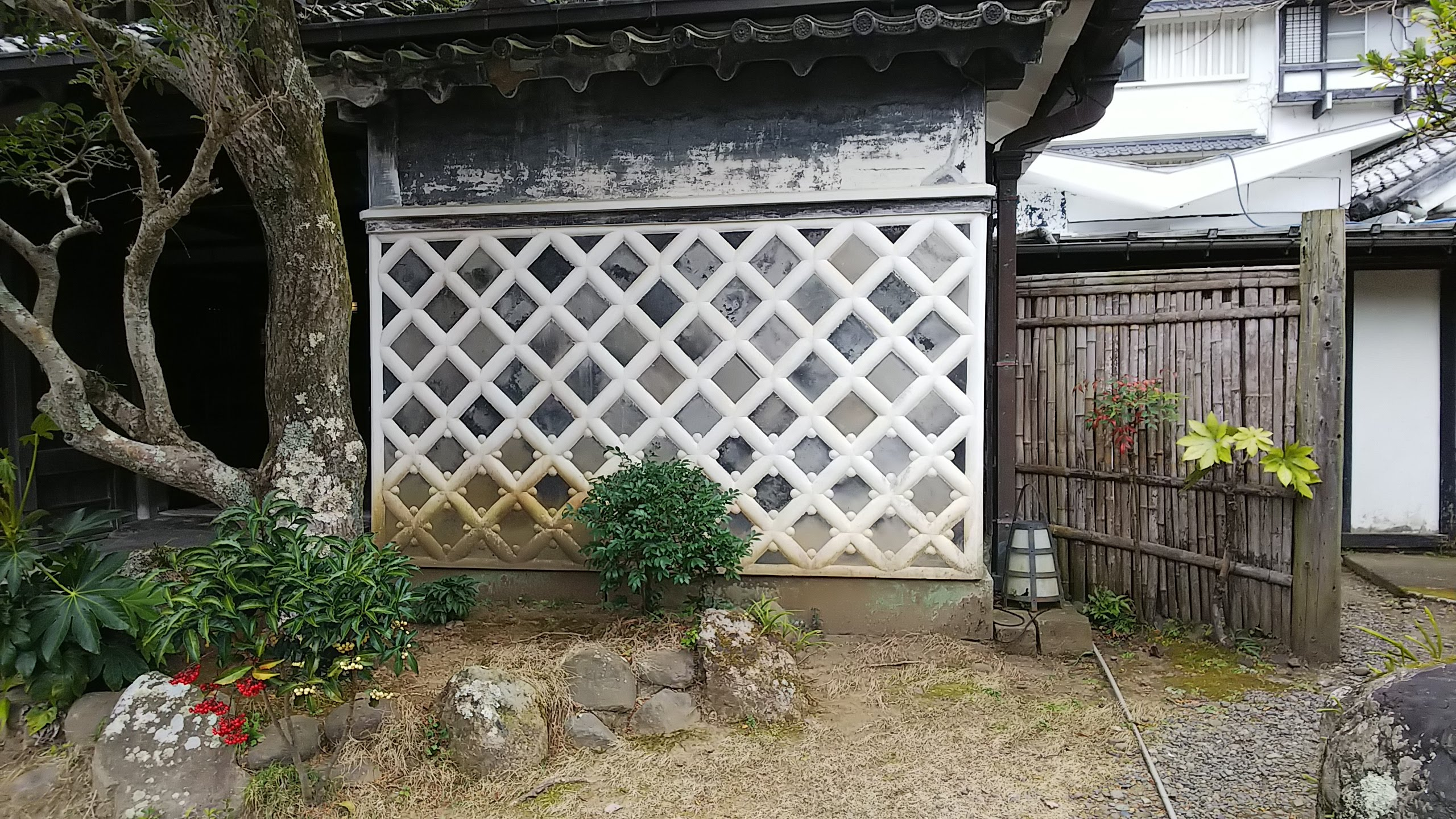 松崎町にある依田邸外壁。ナマコ壁が特徴。